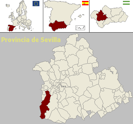 Mapa de localización del municipio sevillano de Aznalcázar (Andalucía, España)